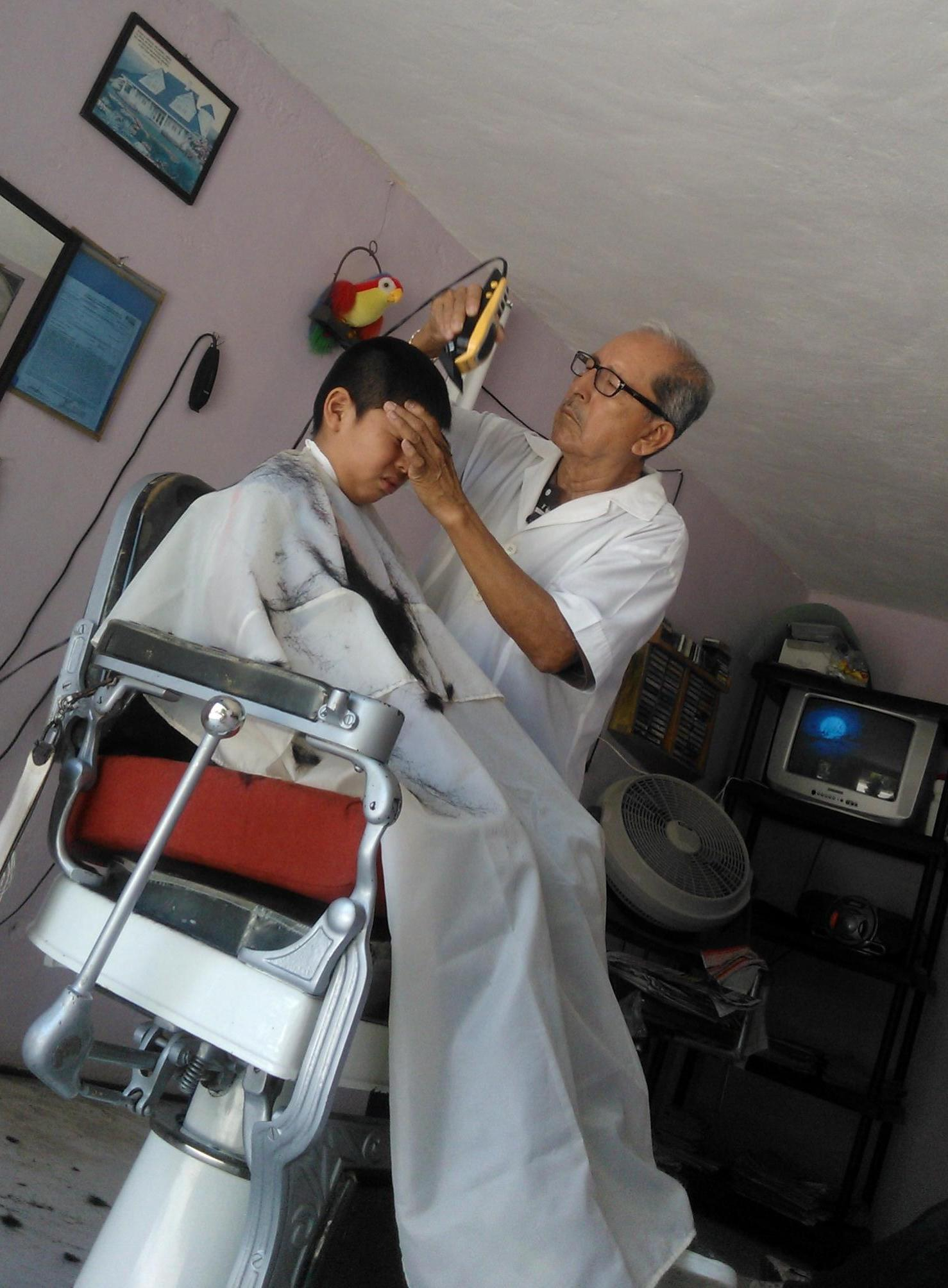 Peluquero trabajando, usando una silla giratoria.